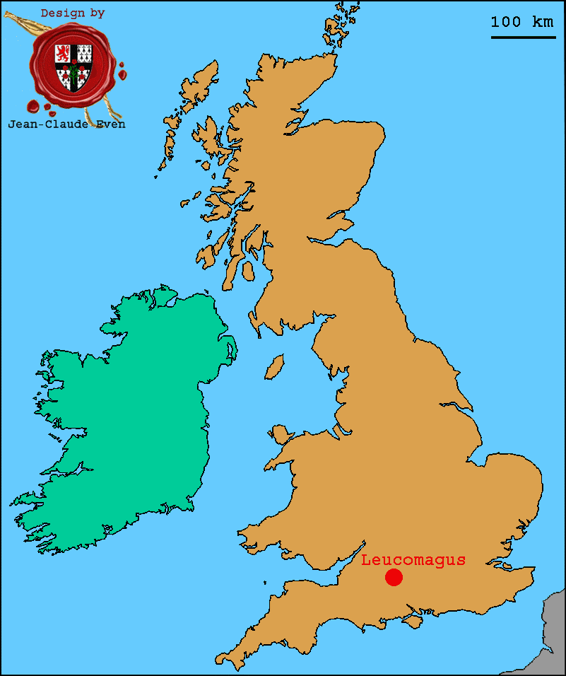 Andover - Leucomagus